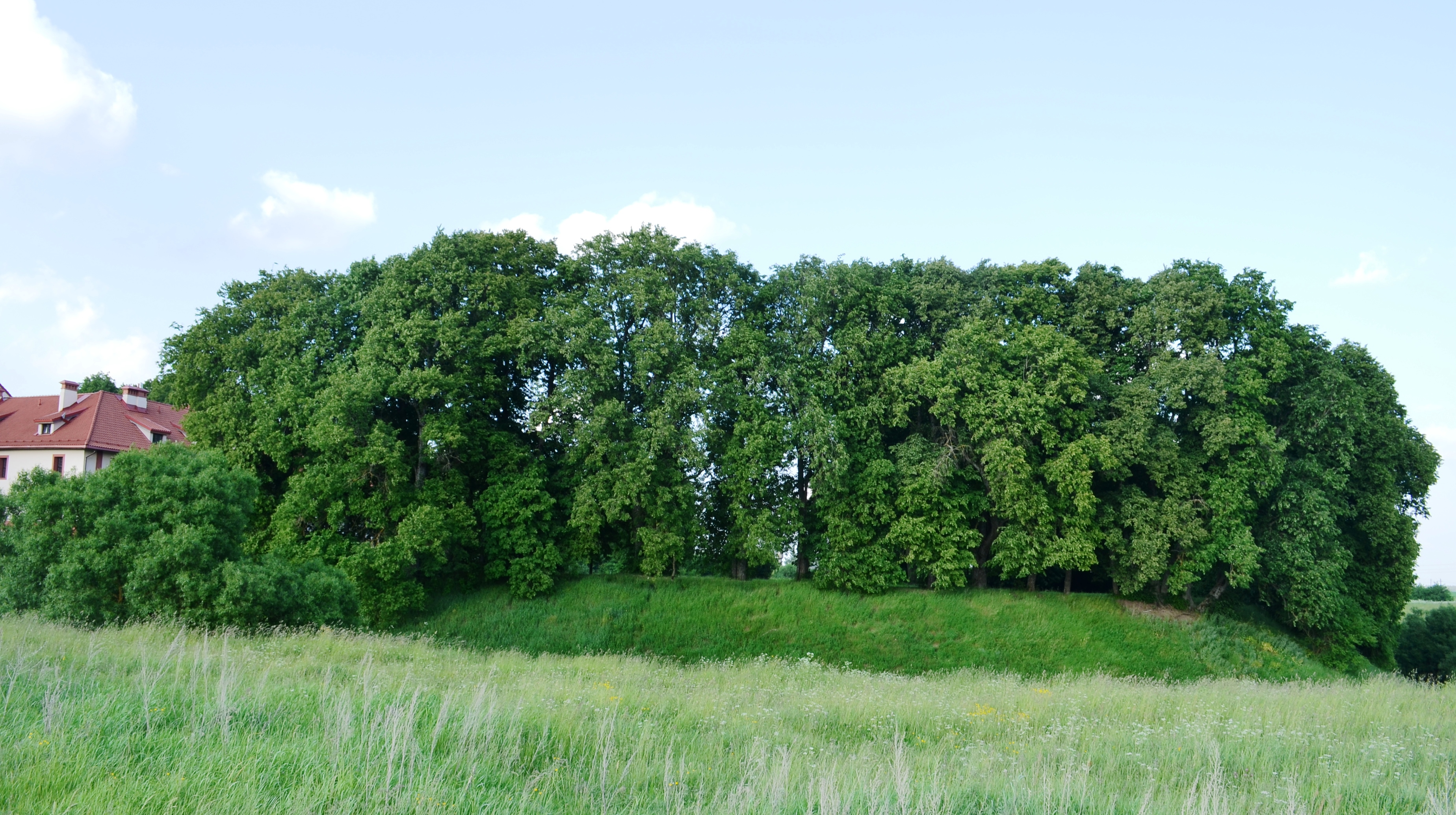 Senųjų Trakų piliavietė iš pietų, Trakų raj.